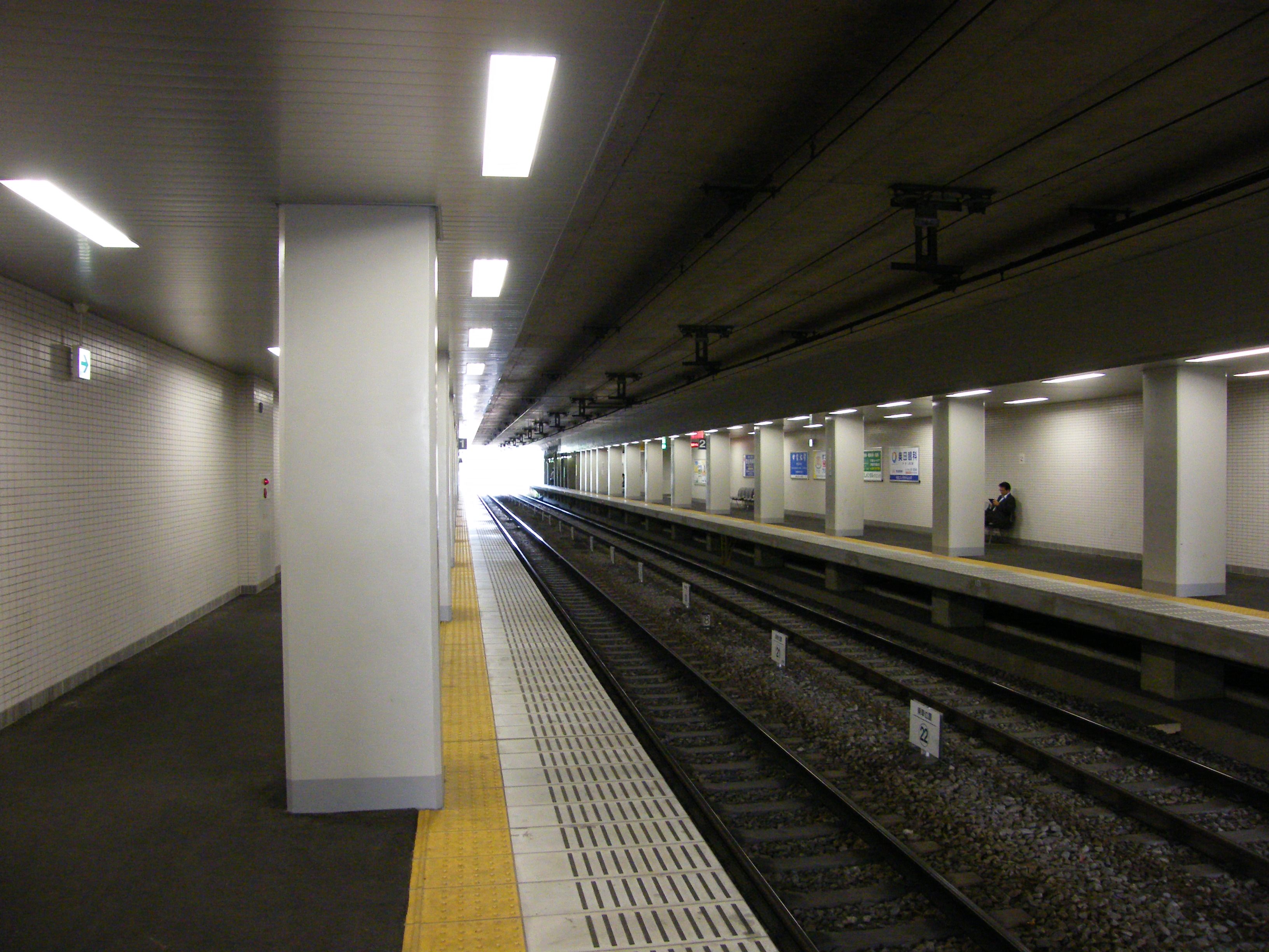 浄水駅ホーム